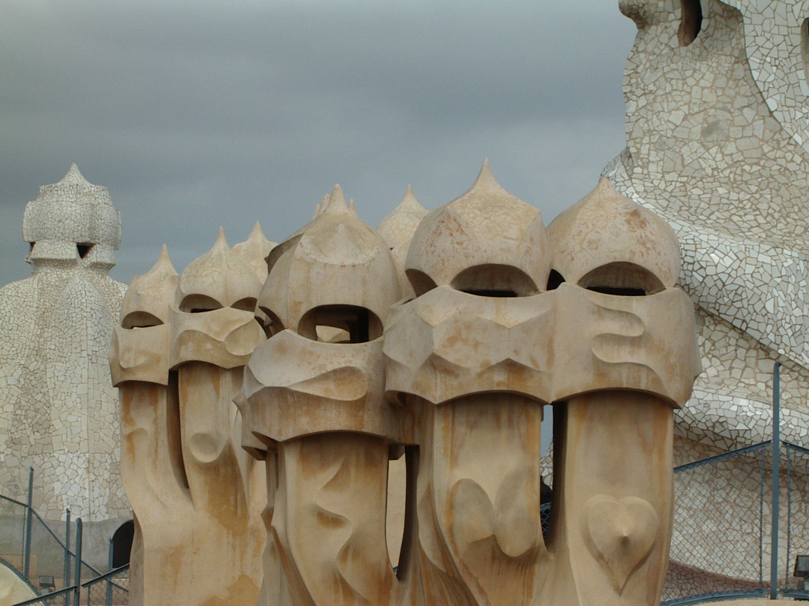 Chimneys of Casa Milà, Barcelona